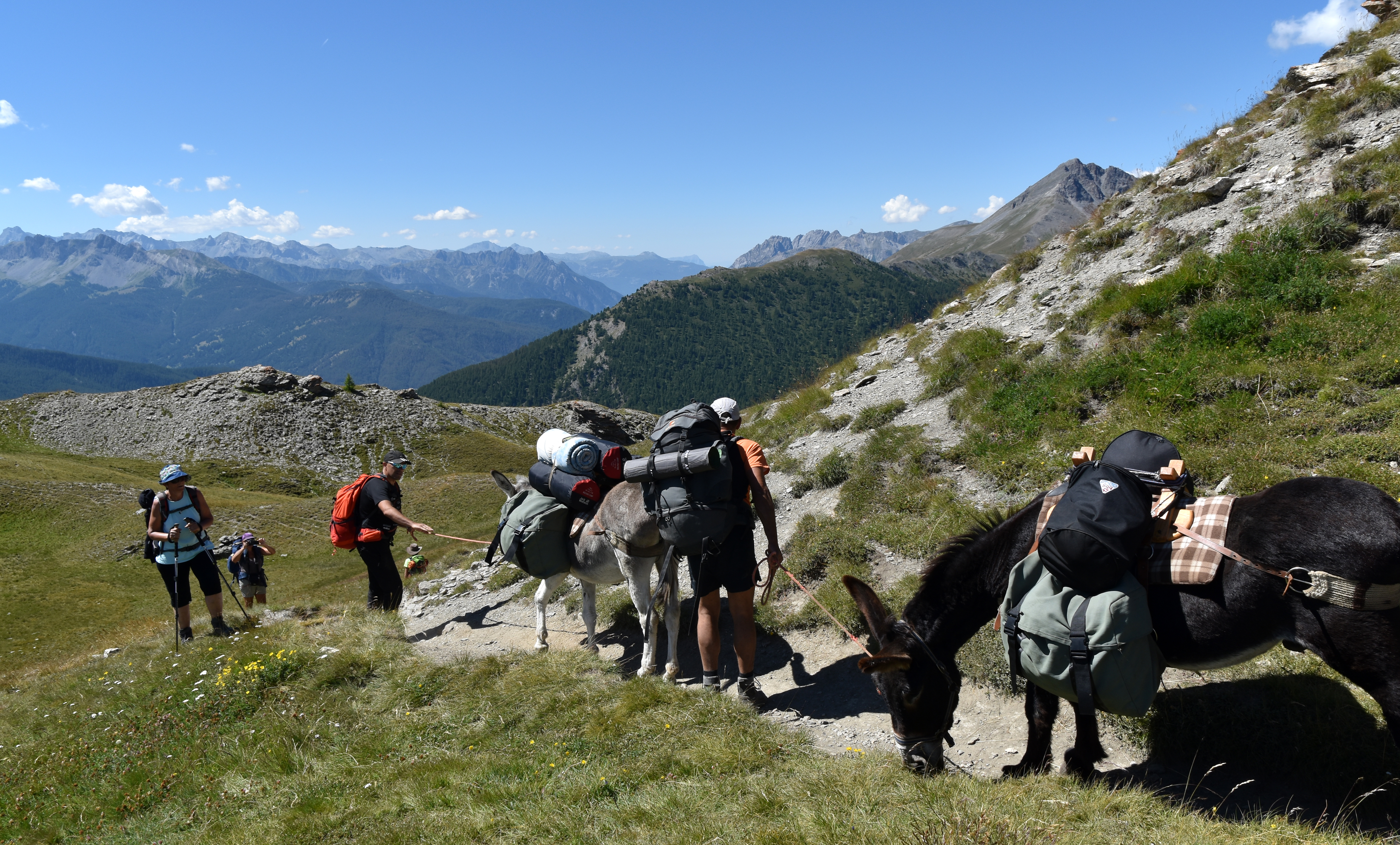 Chemin menant aux lacs Malrif, Aiguilles,Queyras, Hautes-Alpes, France